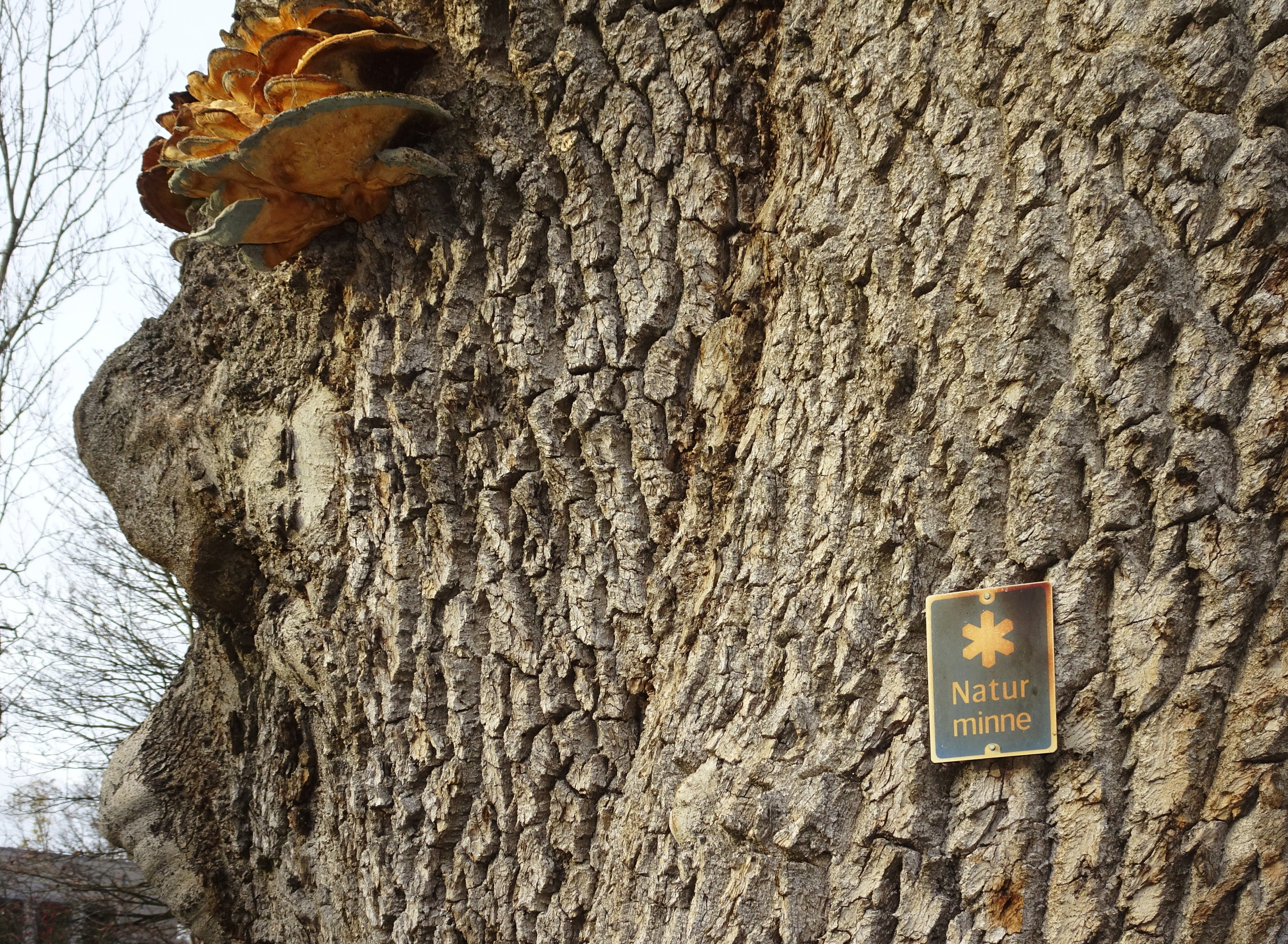 Asken i Vårby källas park. Den har ett stamomkrets på 577 centimeter (uppmätt i brösthöjd år 2005) och är sedan 1960 ett av Huddinges elva naturminnen.